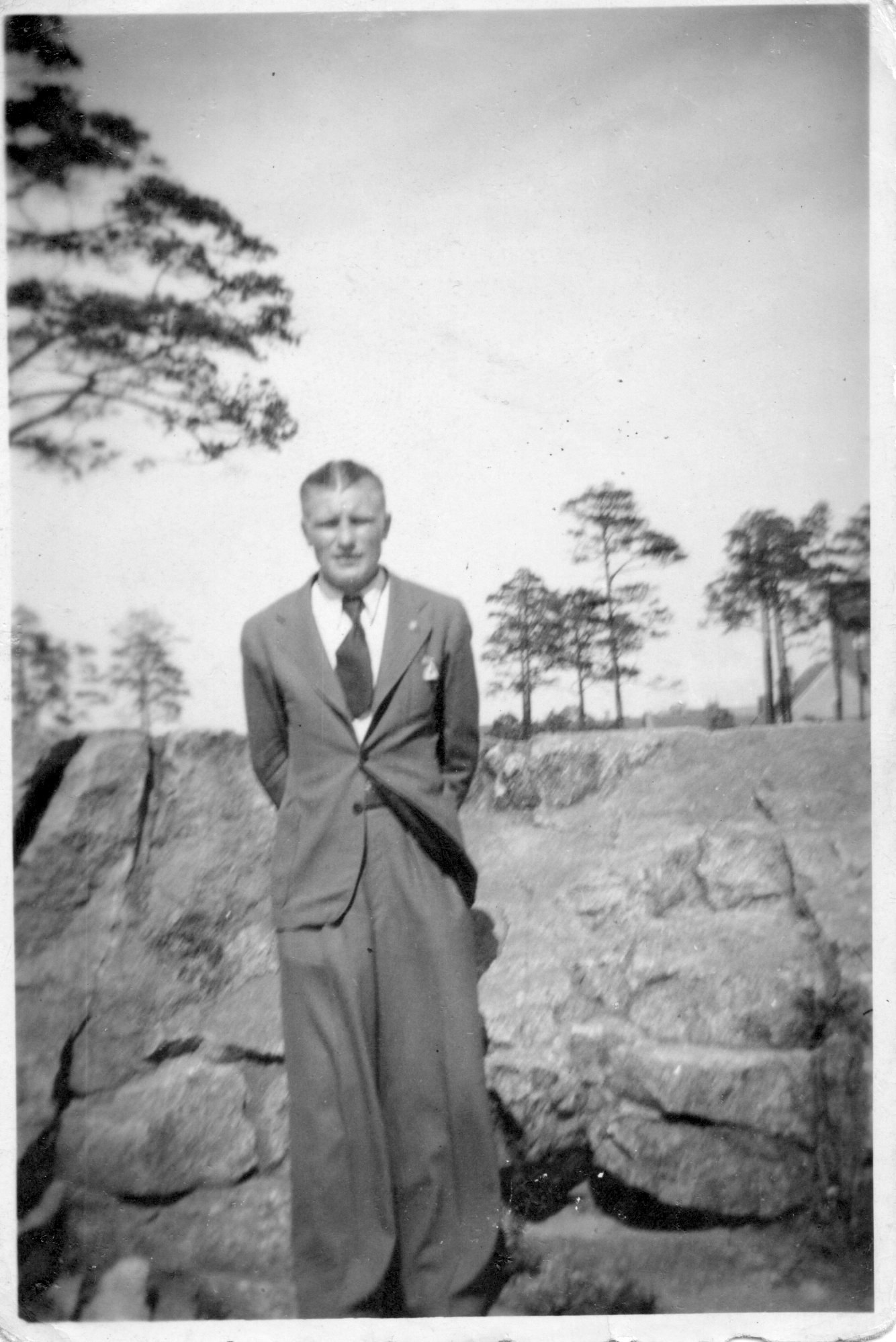 Viljo Suhonen